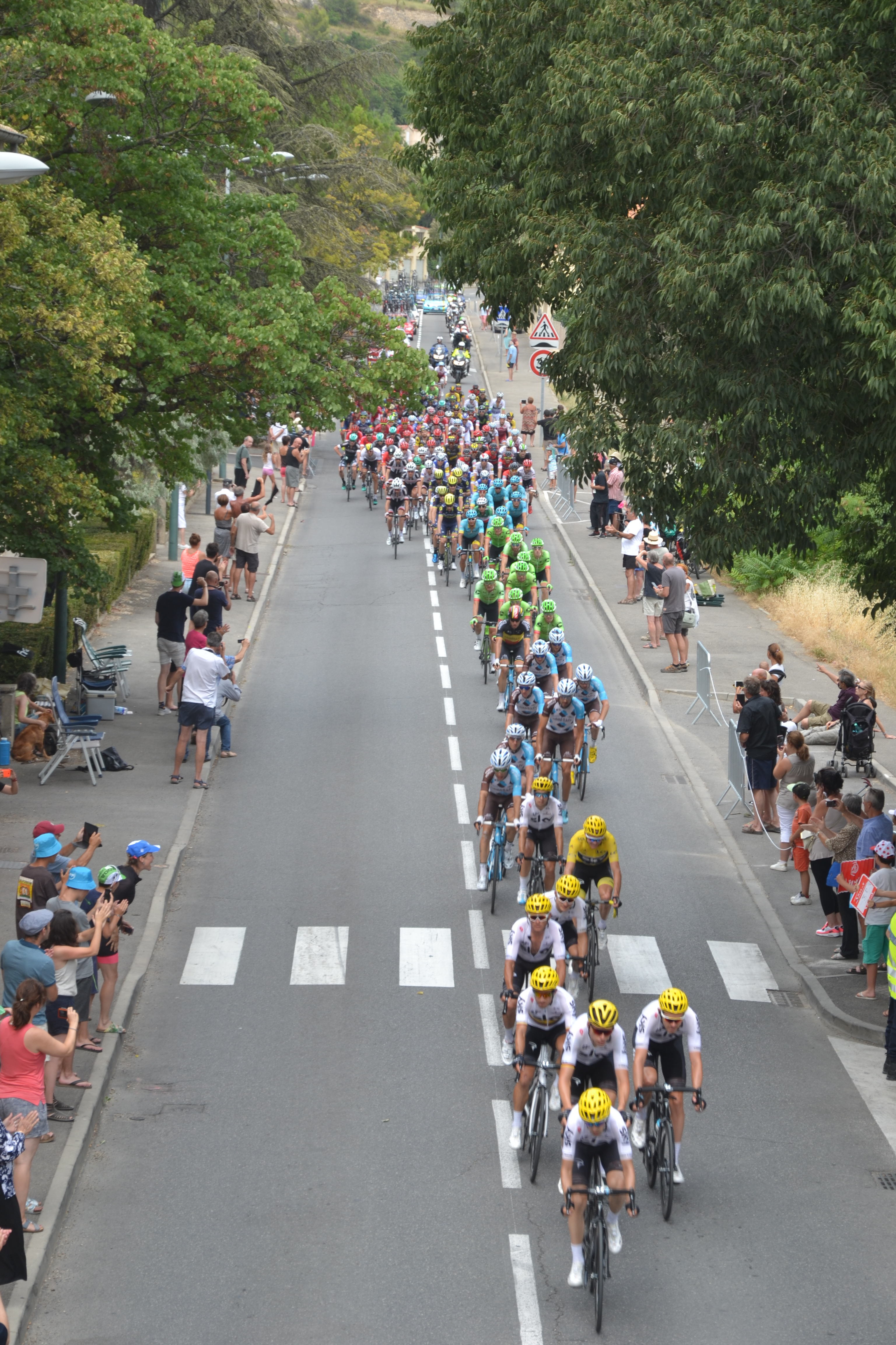 entrée du peloton du Tour de France 2017 à Apt, (84) lors de l'étape 19